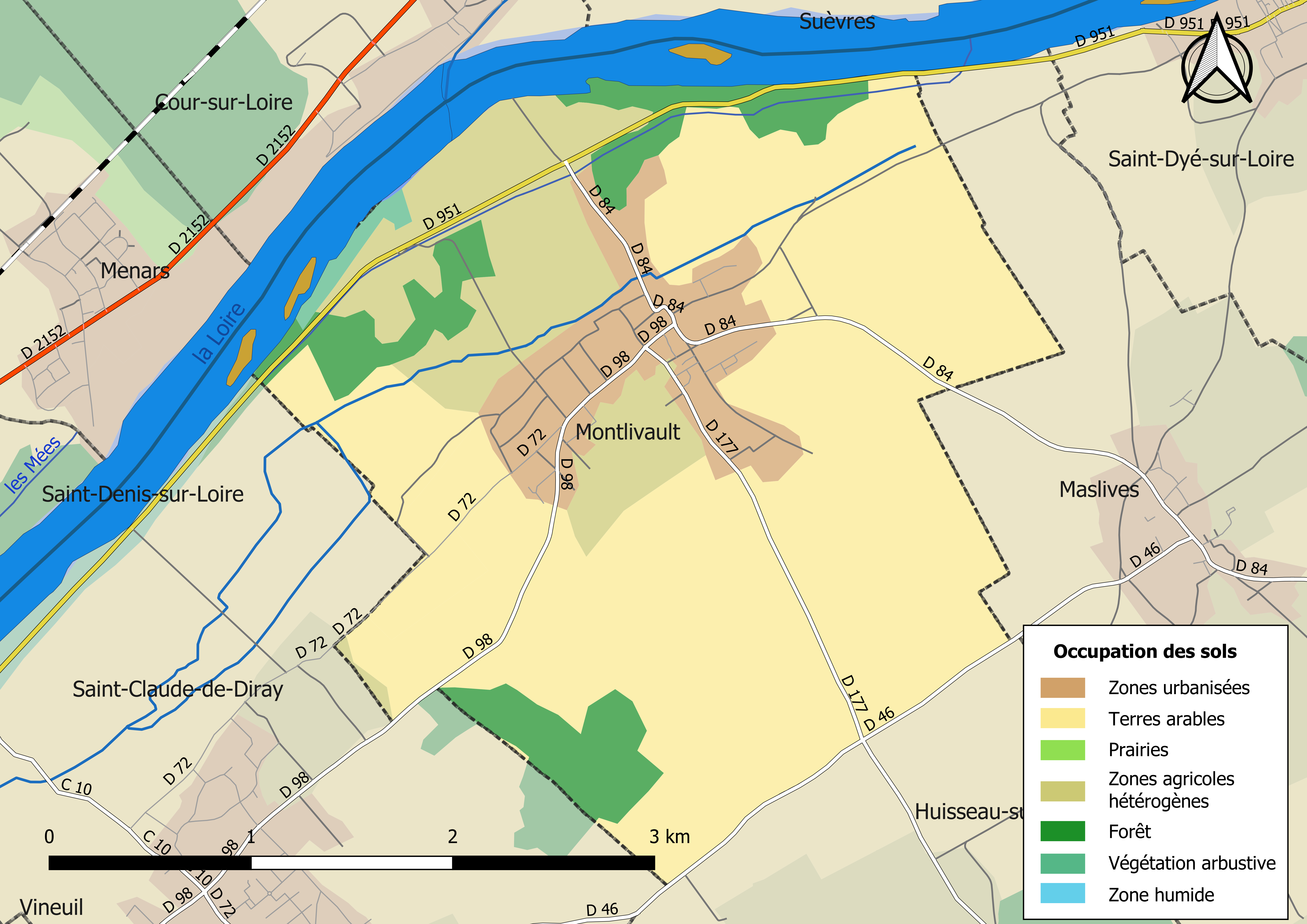 Carte des infrastructures et de l’occupation des sols en 2018 de la commune de Montlivault (France).